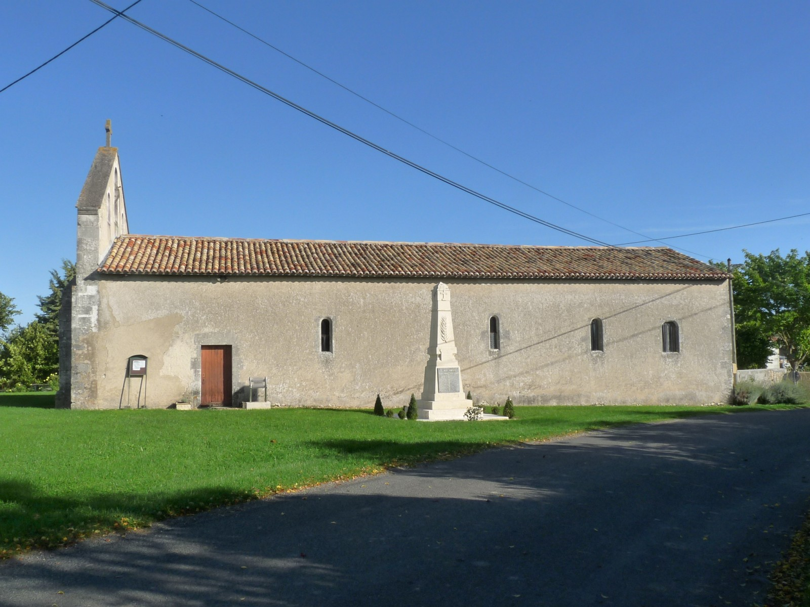 Eglise de Vibrac, Charente-Maritime, France